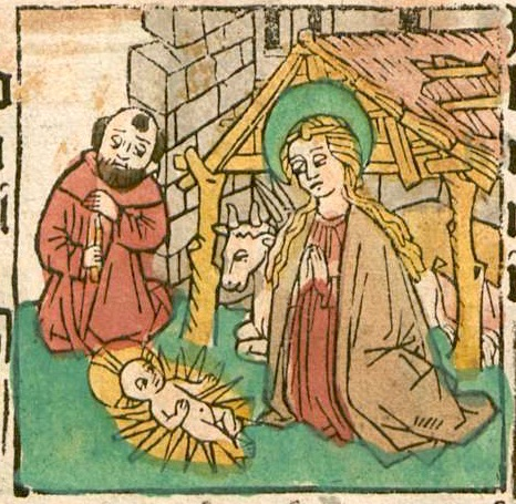 Pfister-Nativité-Crèche